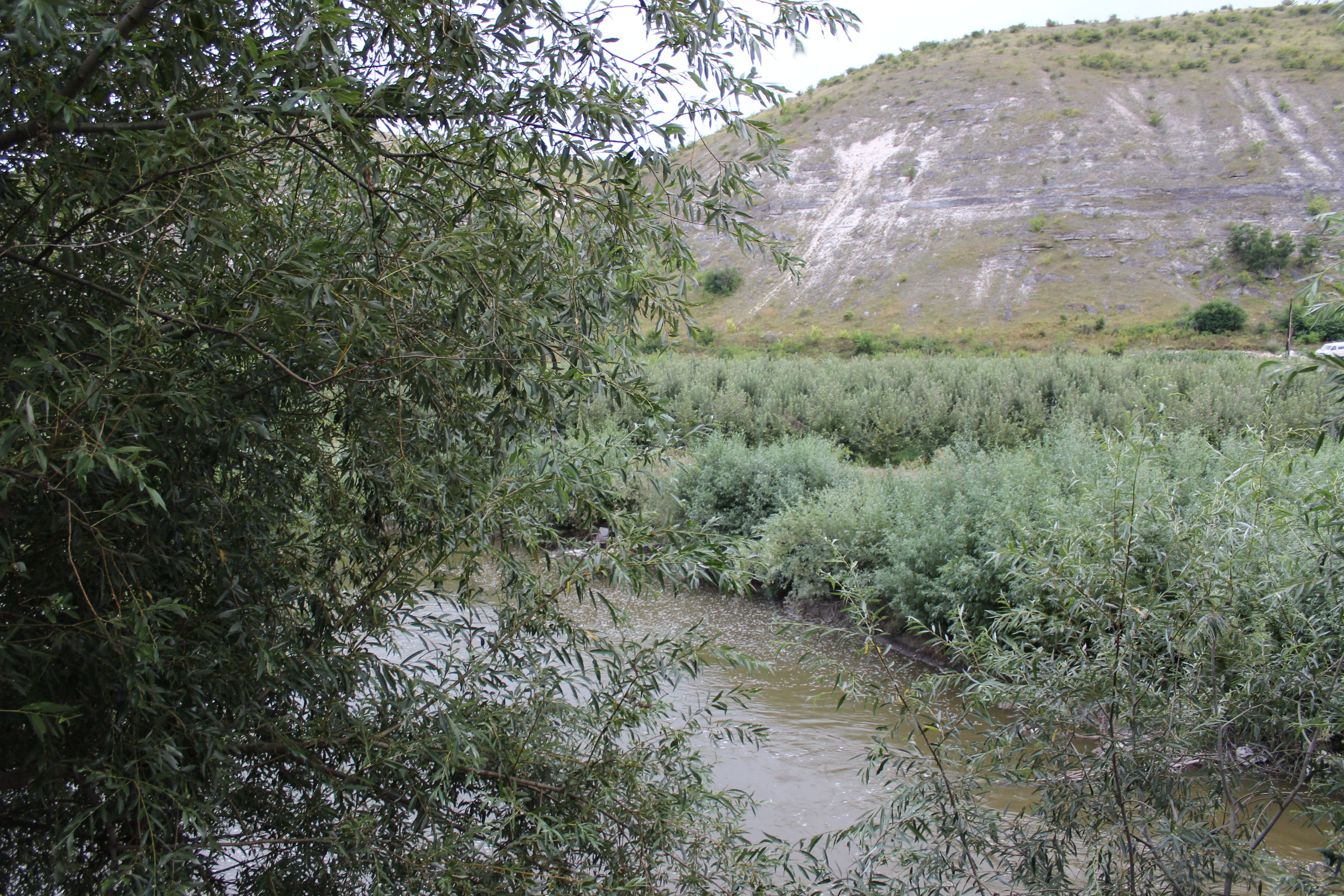 Lunca Răutului la Orheiul Vechi